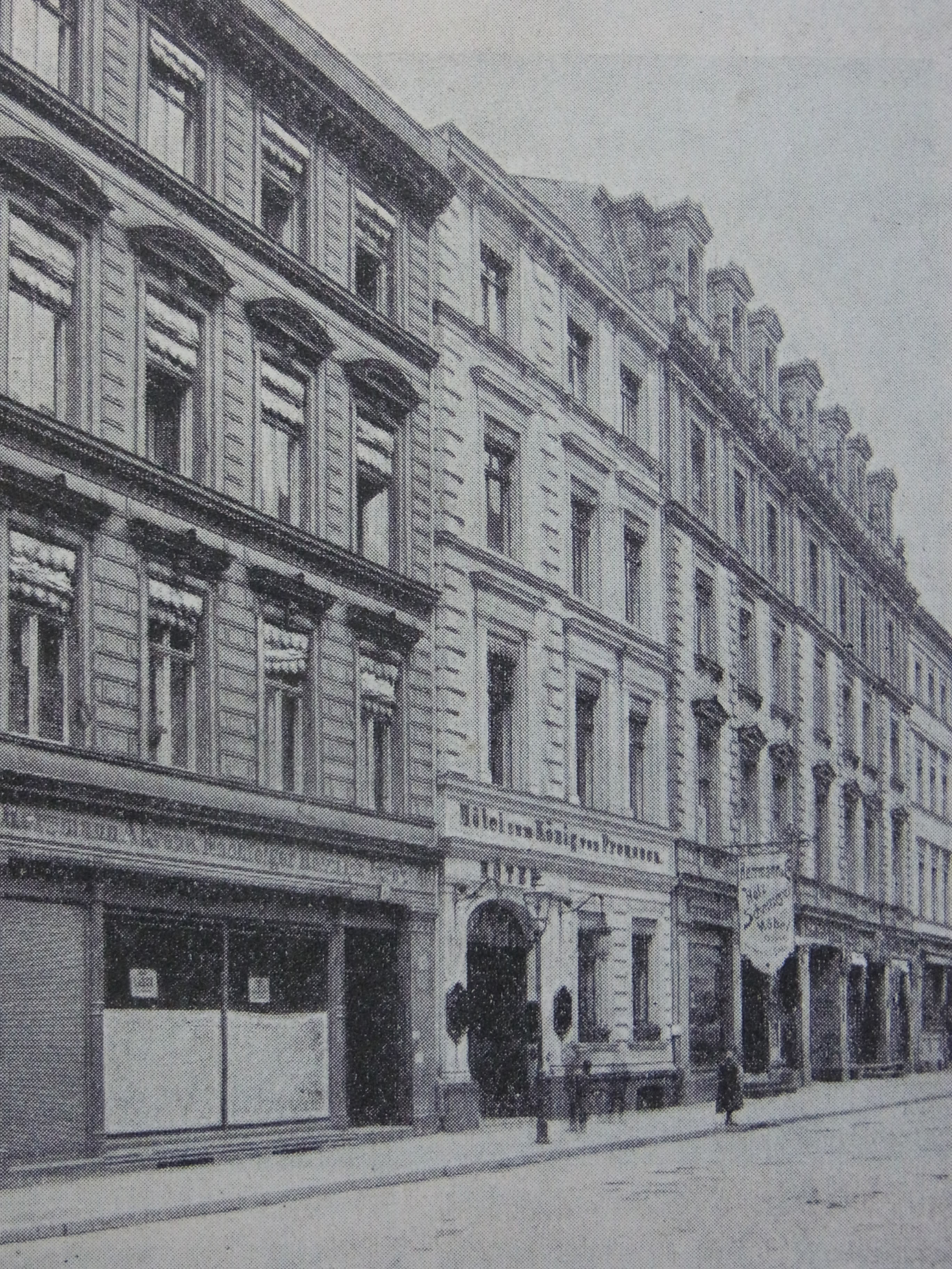 Ansicht des ehemaligen Berliner Hotels "König von Preußen" in der Brüderstraße 39a, 1903.